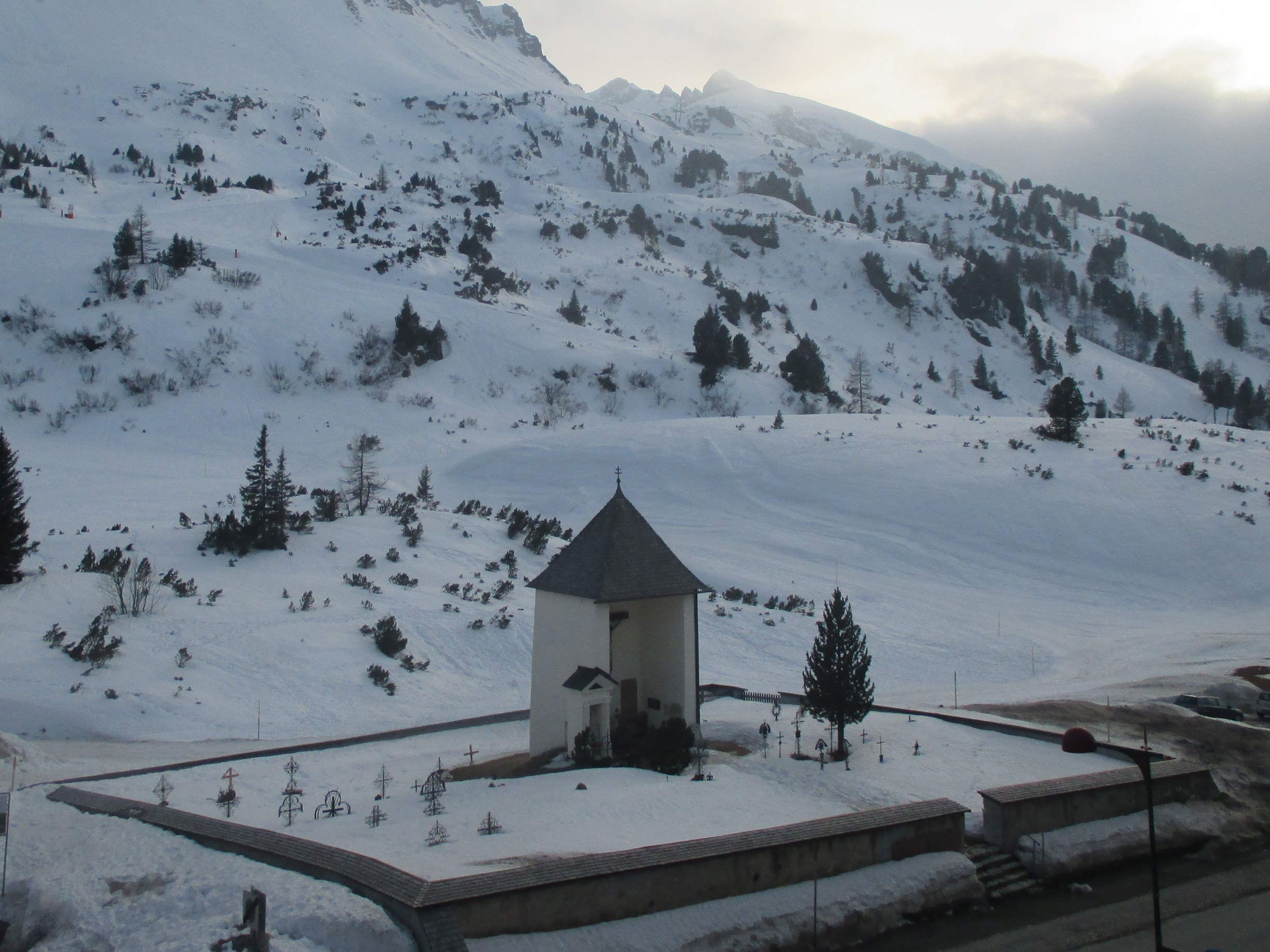 Foto Tauernfriedhof